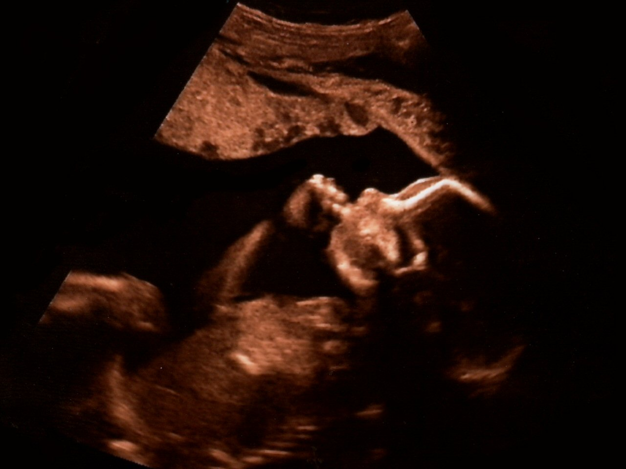 Feindiagnostik (Ultraschall)